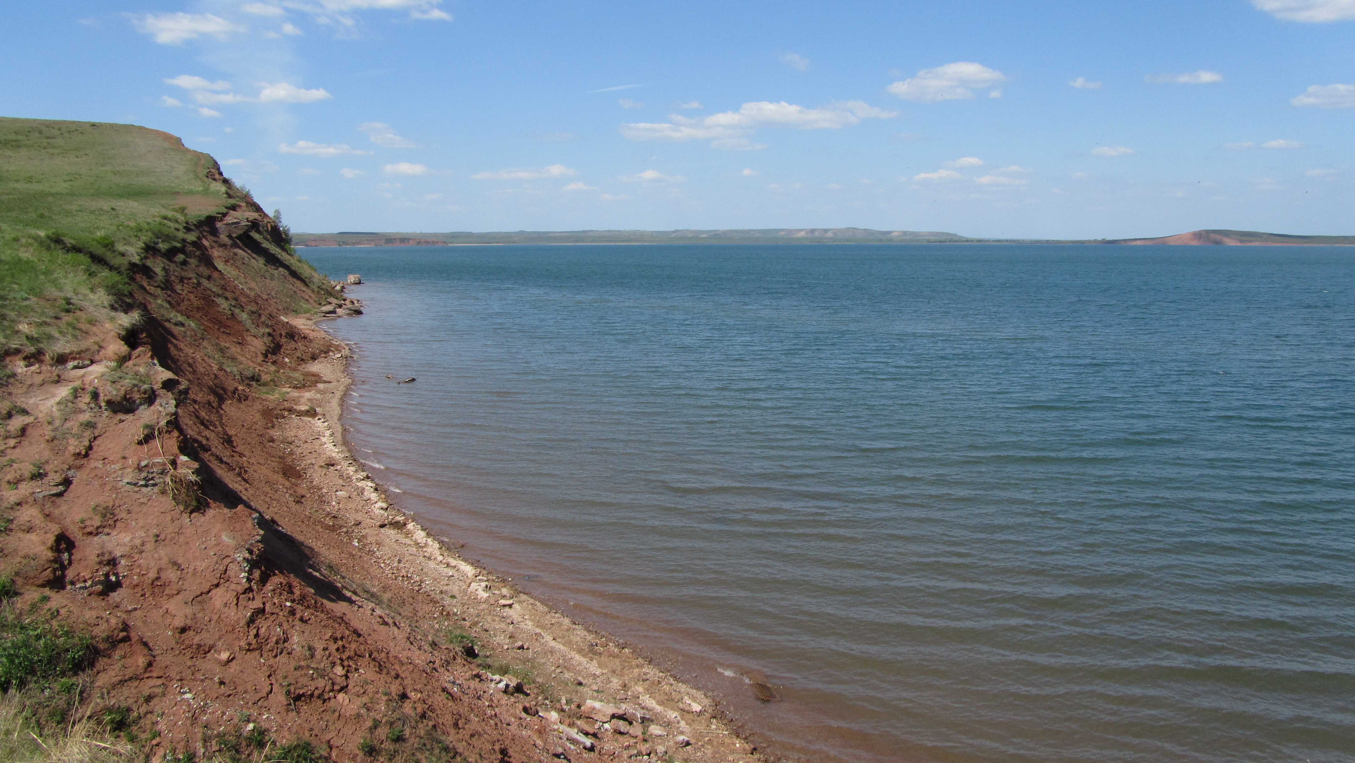 Аслы-Куль, Давлекановский район This image is related to the protected area of Russia number 0210115